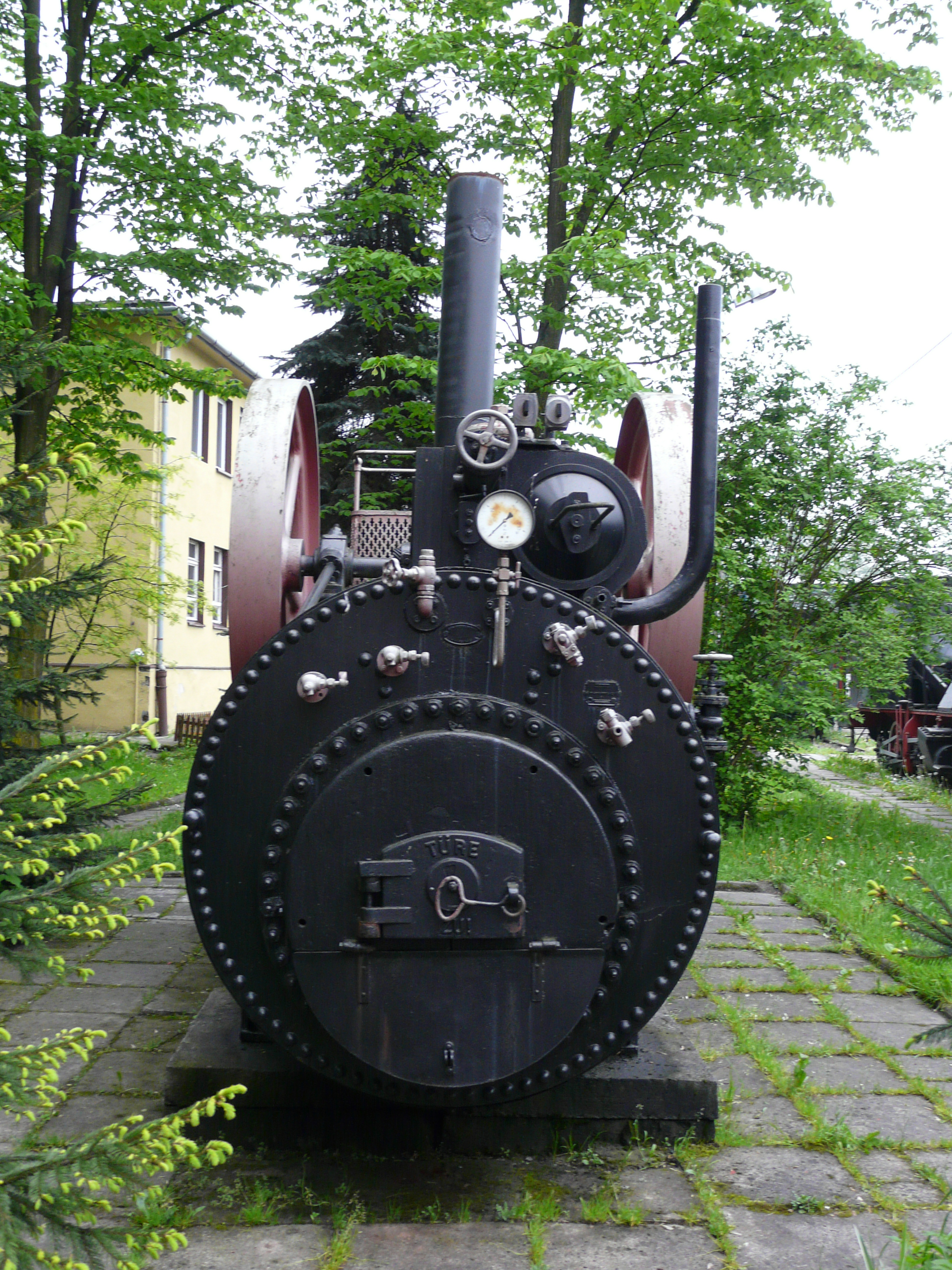 Skansen taboru kolejowego w Chabówce / Chabówka Rolling-Stock Heritage Park